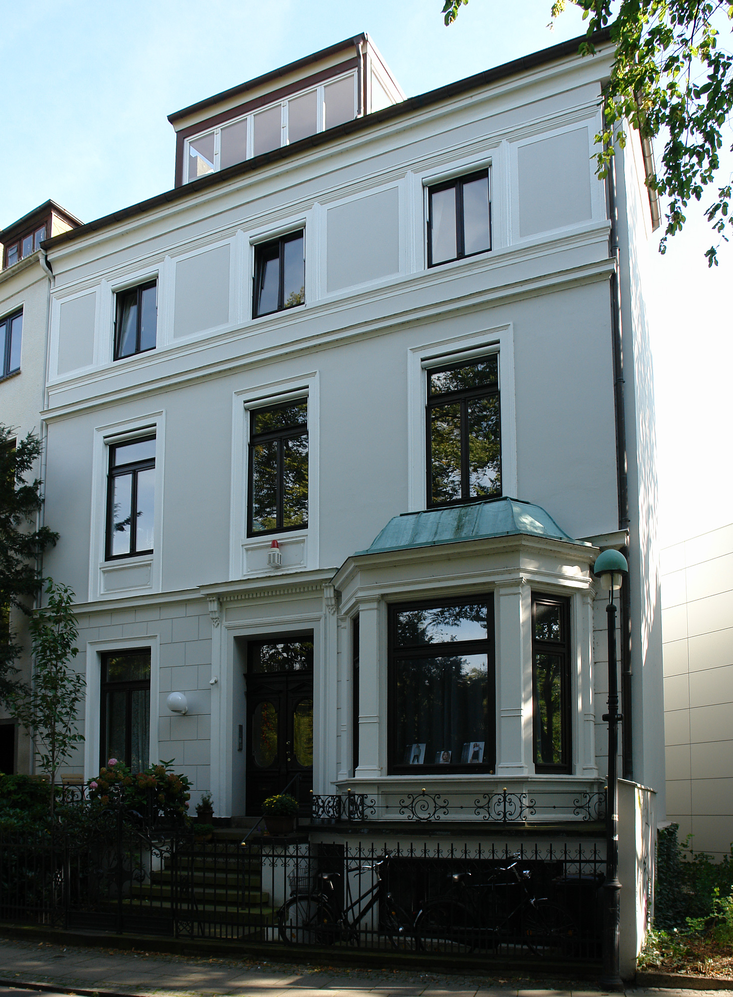 Wohnhaus in Bremen, Contrescarpe 27.Das abgebildete Objekt ist ein geschütztes Kulturdenkmal in der Freien Hansestadt Bremen, mit der Nr. 0280 beim Landesamt für Denkmalpflege registriert.